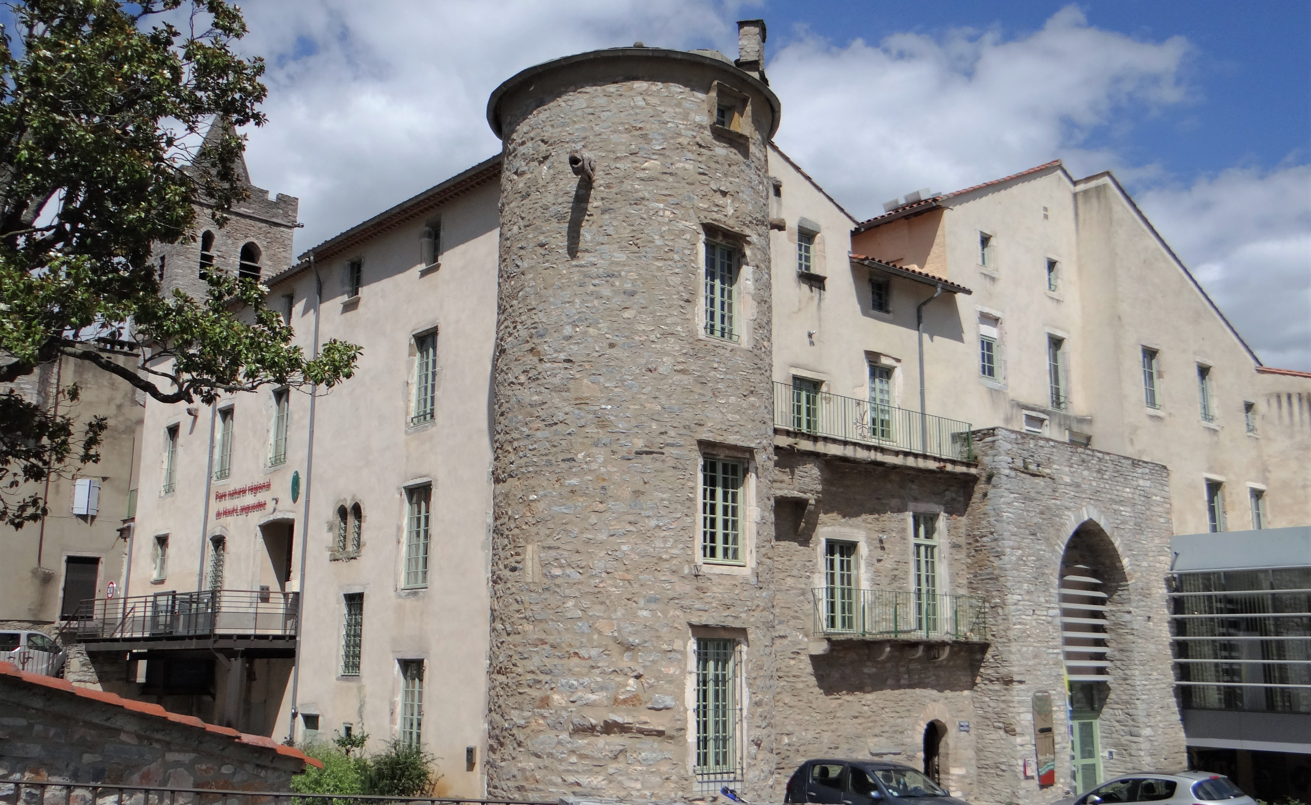 Saint-Pons-de-Thomières - Siège du Parc naturel régional du Haut-Languedoc, 1, place du Foirail